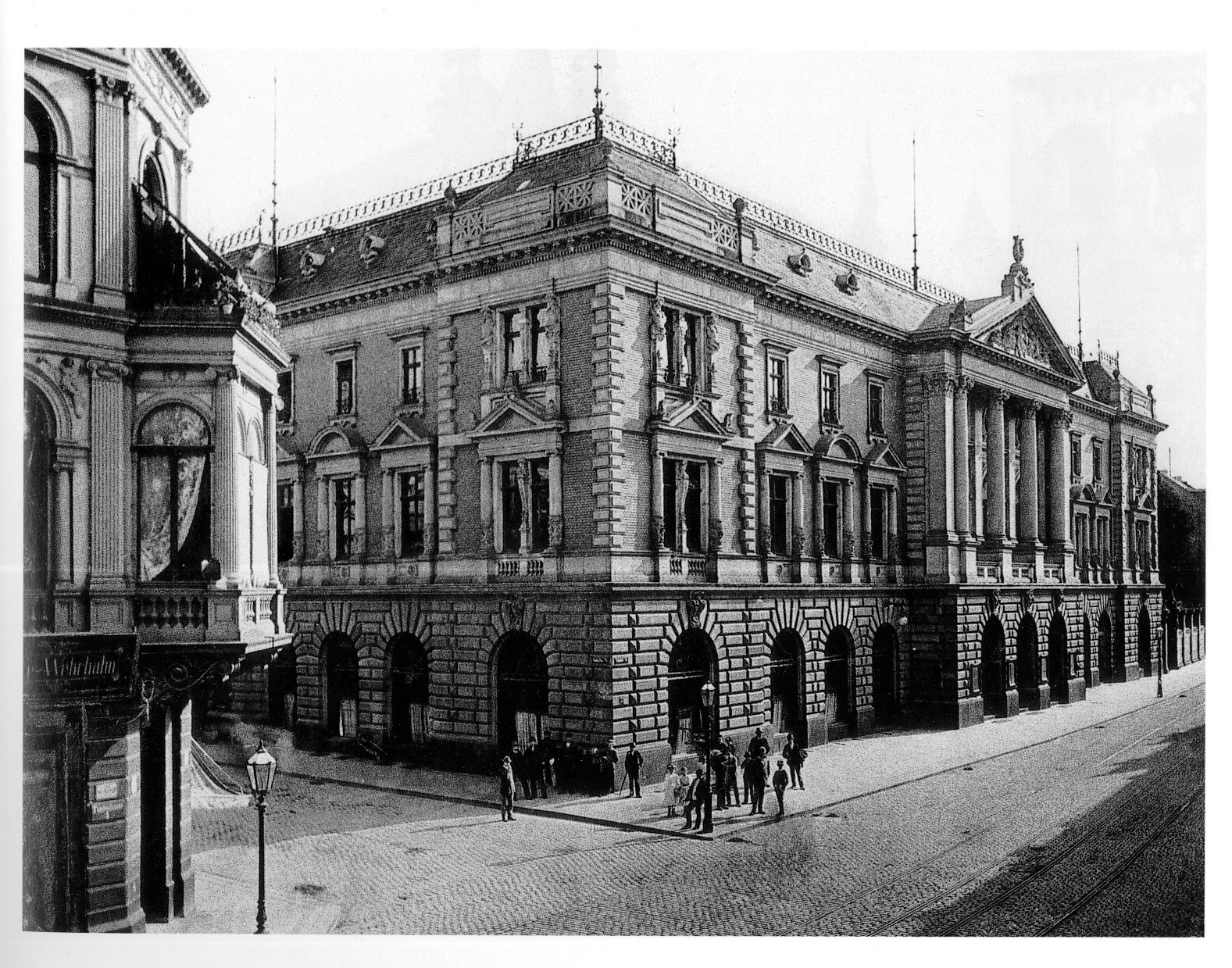 Alte städtische Tonhalle in Düsseldorf, 1863, Erweiterung von 1889 bis 1892, Architekten Hermann vom Endt und Bruno Schmitz, Stadtbaumeister Eberhard Westhofen und Stadtbaurat Peiffhoven, Gebäude an der Schadowstraße, Ecke Tonhallenstraße 1894.jpg